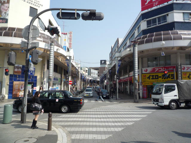 京急久里浜駅前から商店街入り口を撮影。